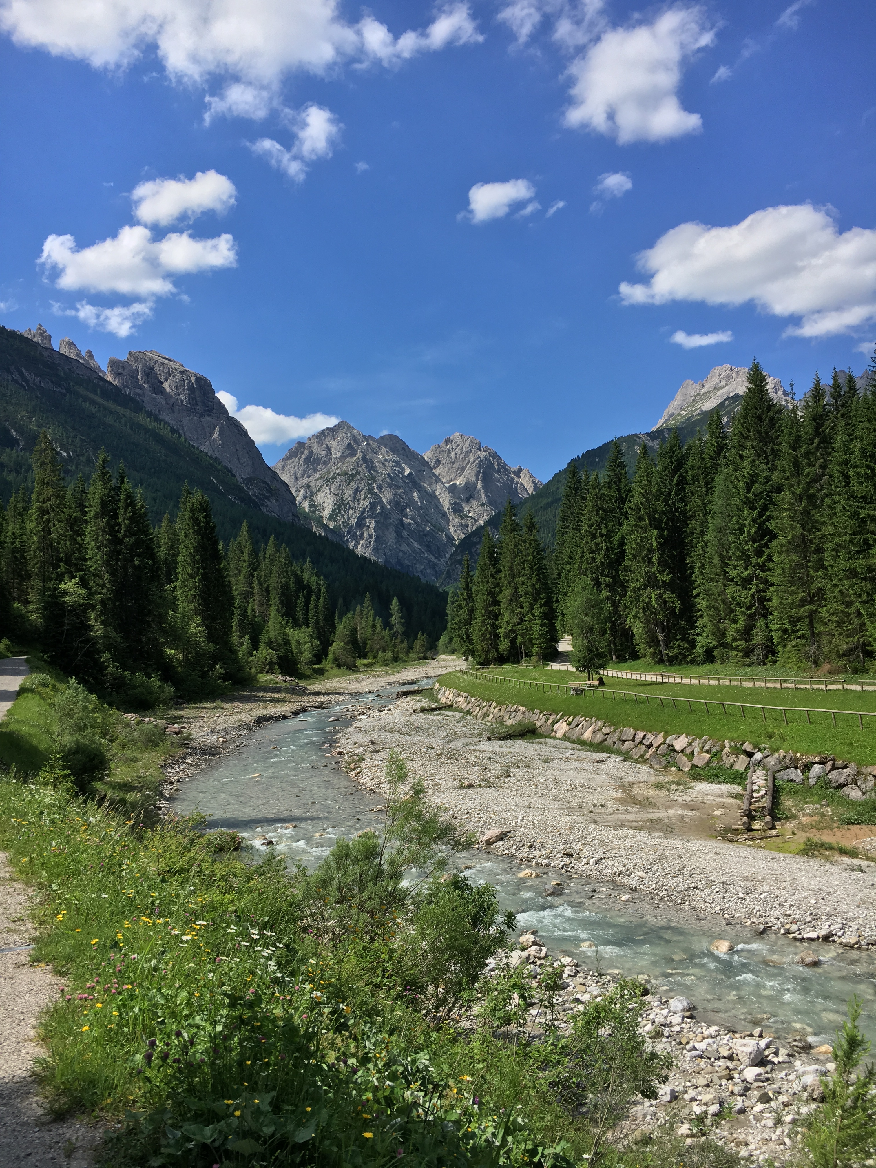 Il Rio Storto a Sappada